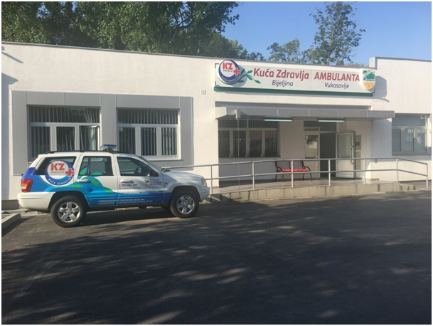 Srpskohrvatski / српскохрватски: ambulanta porodične medicine